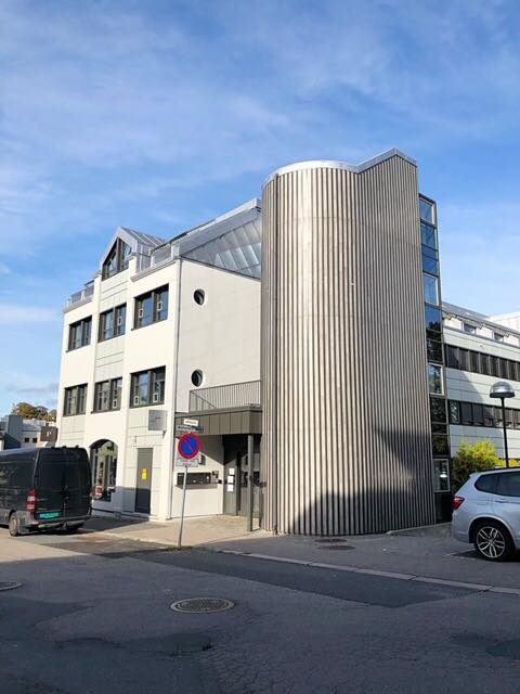 Welhavens gate 2